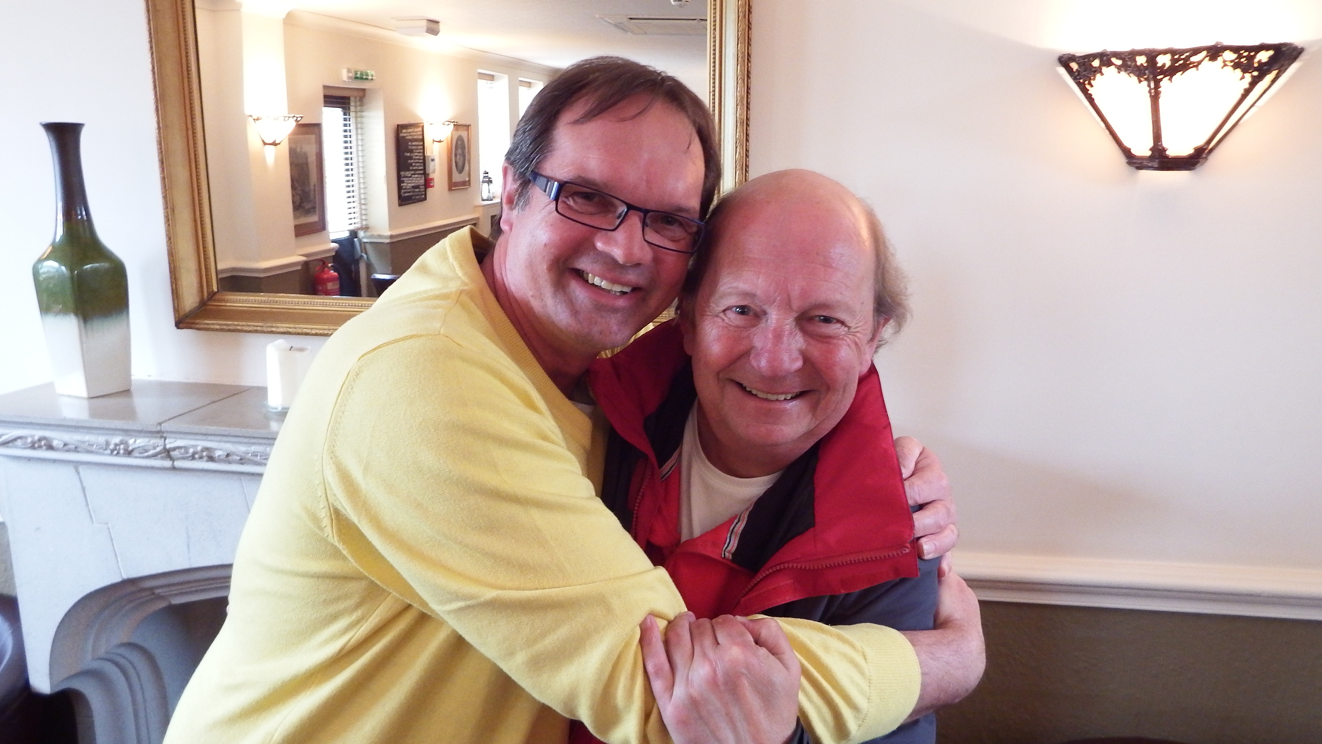 Ronnie Raymond im Jahre 2014 mit Autor Klaus F. Rödder